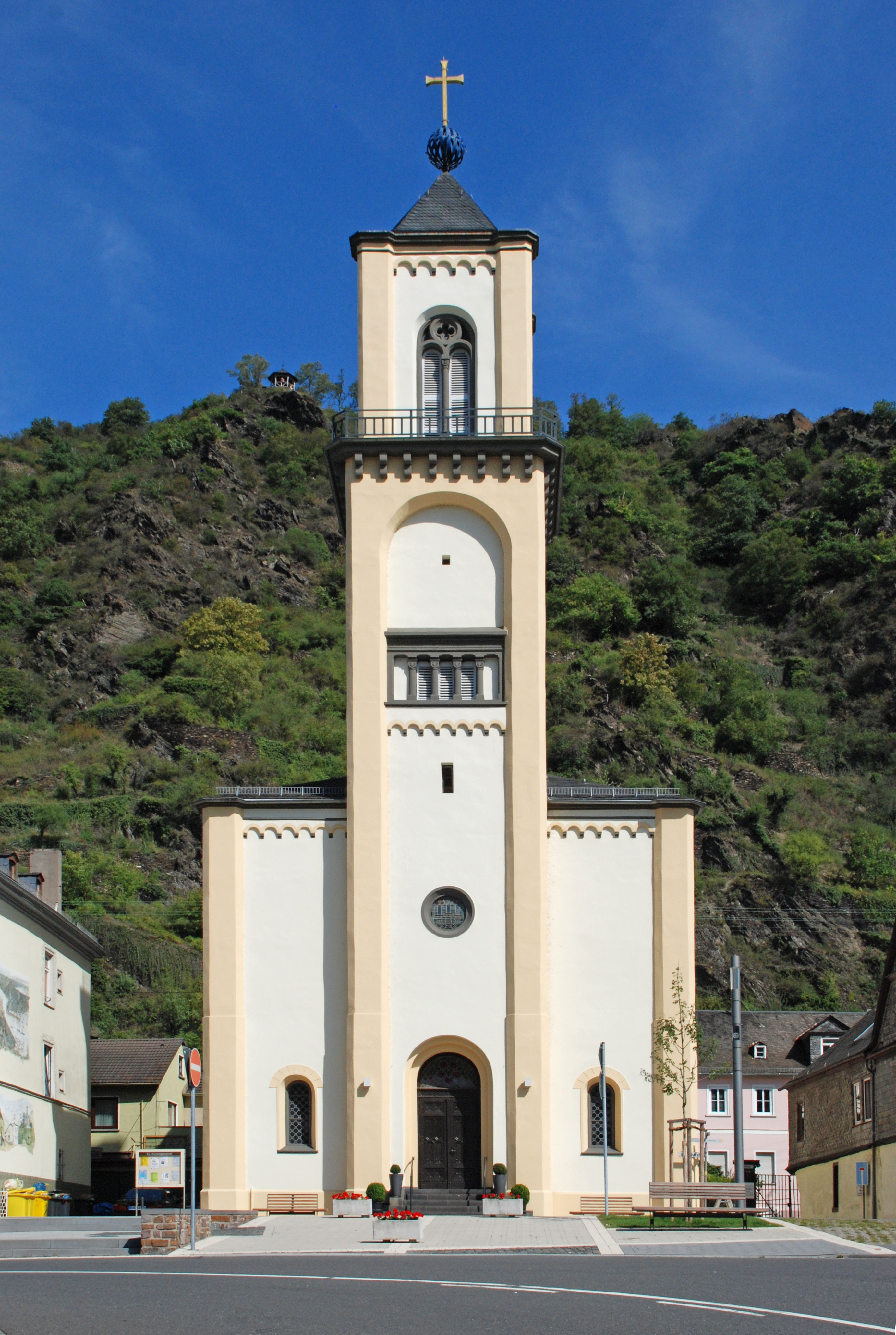 Evangelische Kirche in Sankt Goarshausen, Rhein-Lahn-Kreis, Rheinland-Pfalz. Als Denkmal im nachrichtlichen Verzeichnis der Kulturdenkmäler Rhein-Lahn-Kreis aufgeführt.